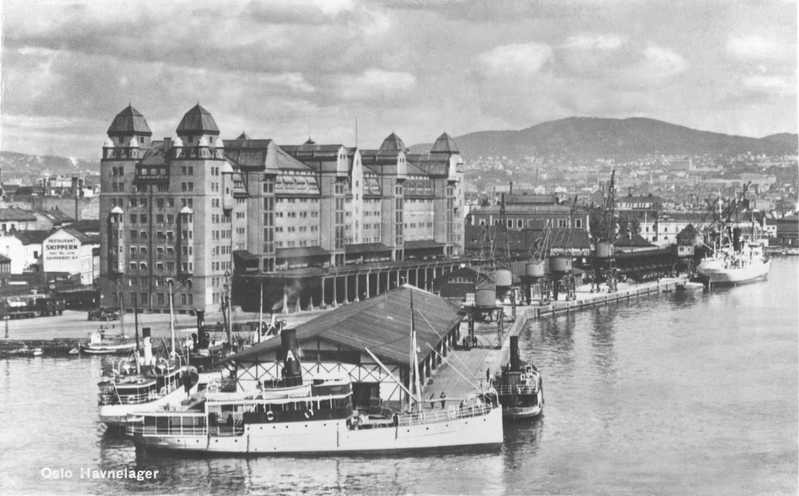 Oslo Havnelager, antakelig 1930-tallet